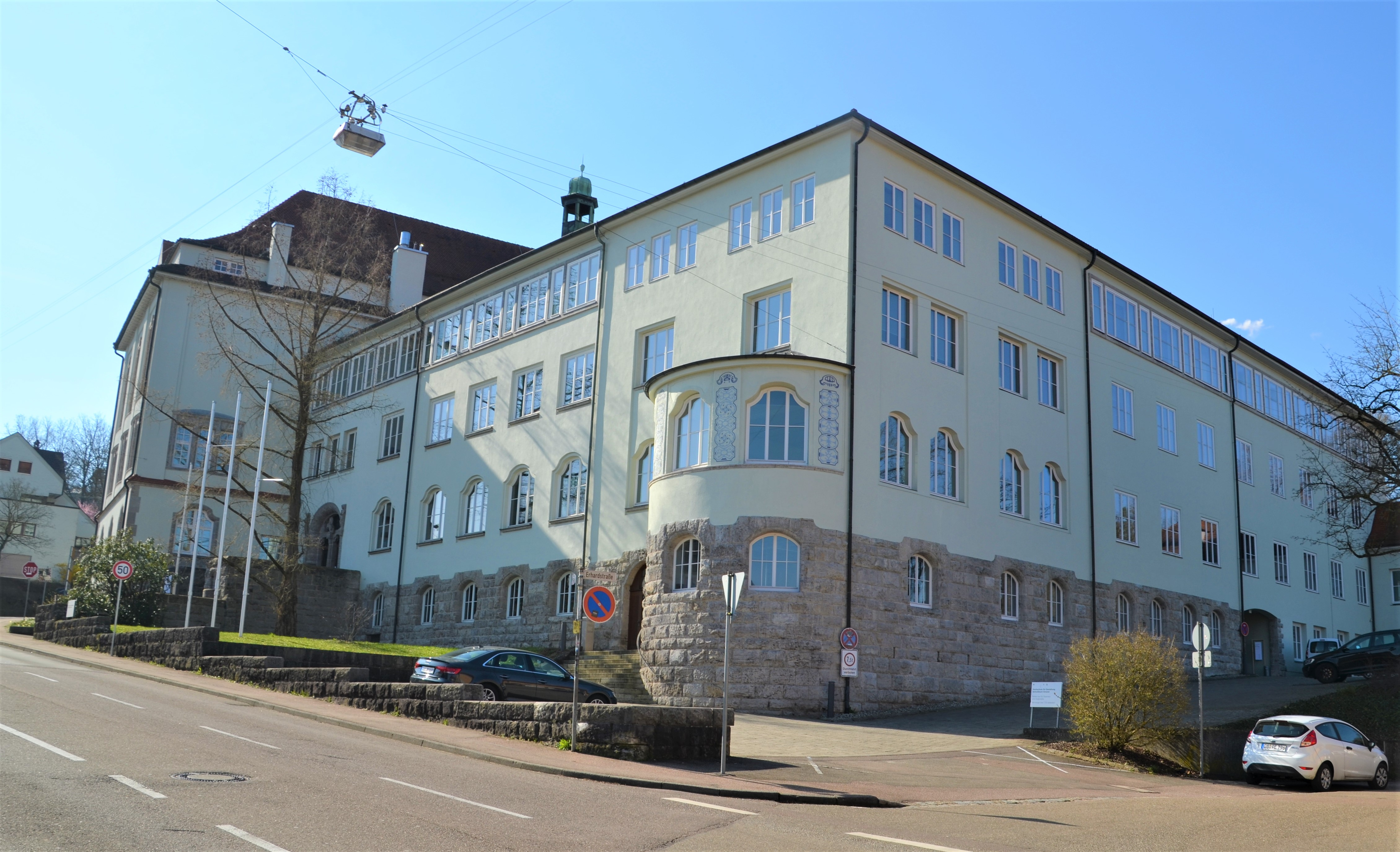 Elseasserbau der HfG Gmünd von Nordosten